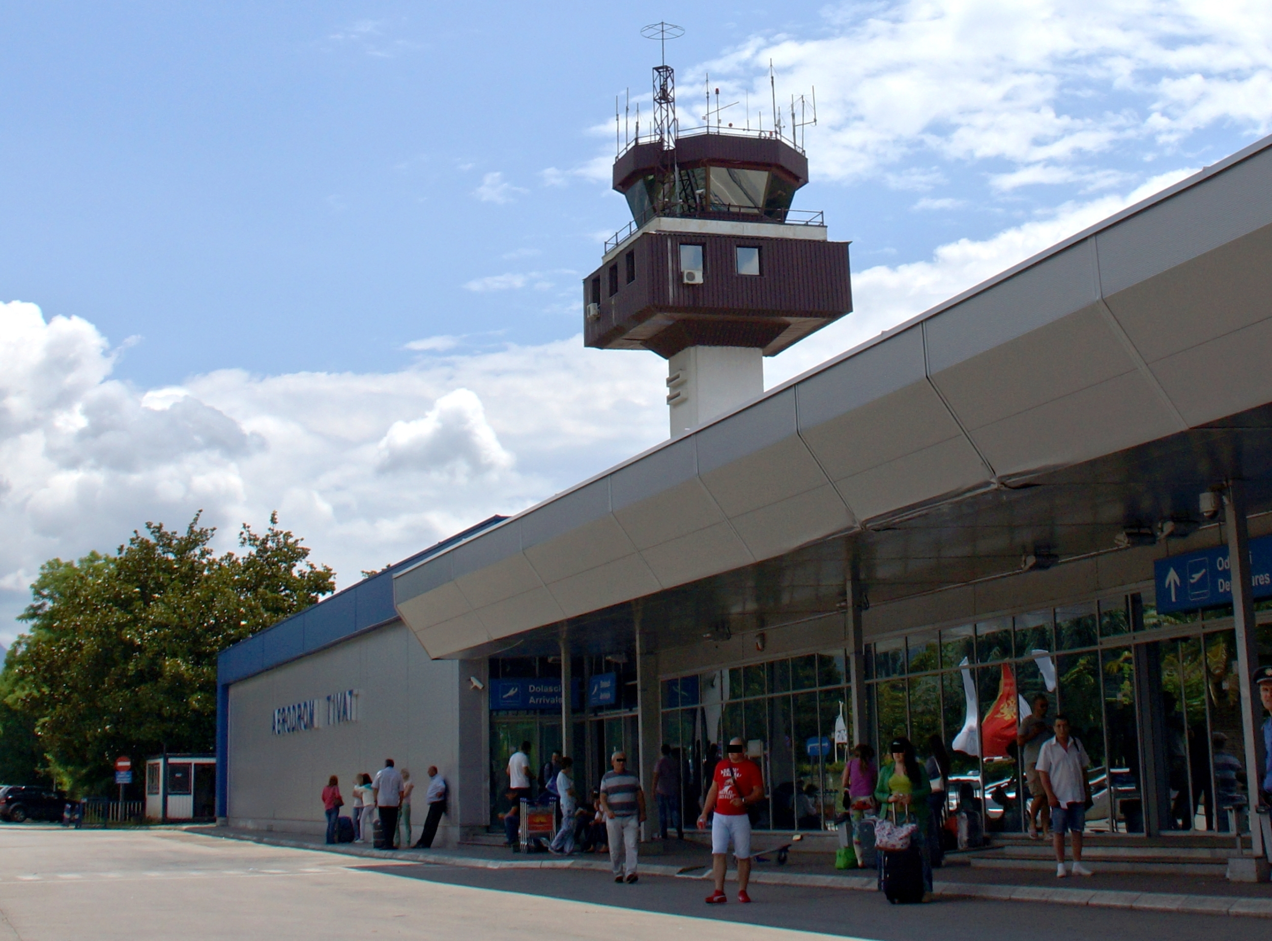 Flughafen Tivat, Bucht von Kotor, Montenegro. Airport Building & Tower. Foto Wolfgang Pehlemann DSC05572.jpg